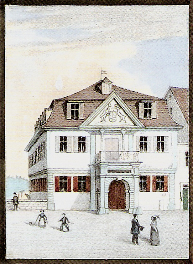 Alte Aula in Tübingen (aus Sammelbild, aquarelierte Lithographie, 8,6 × 6 cm, Inventarnummer 619)